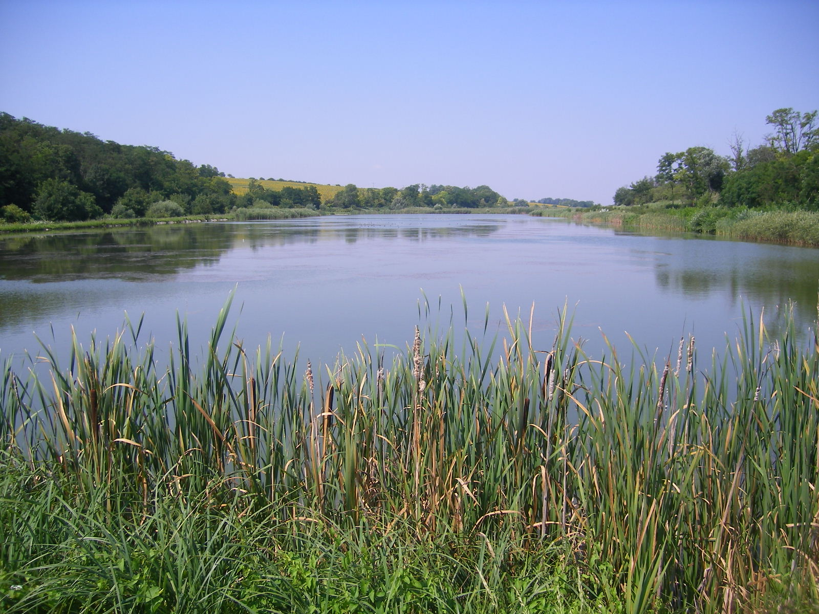 Kőhídgyarmat - víztározó a Párizsi-patakon